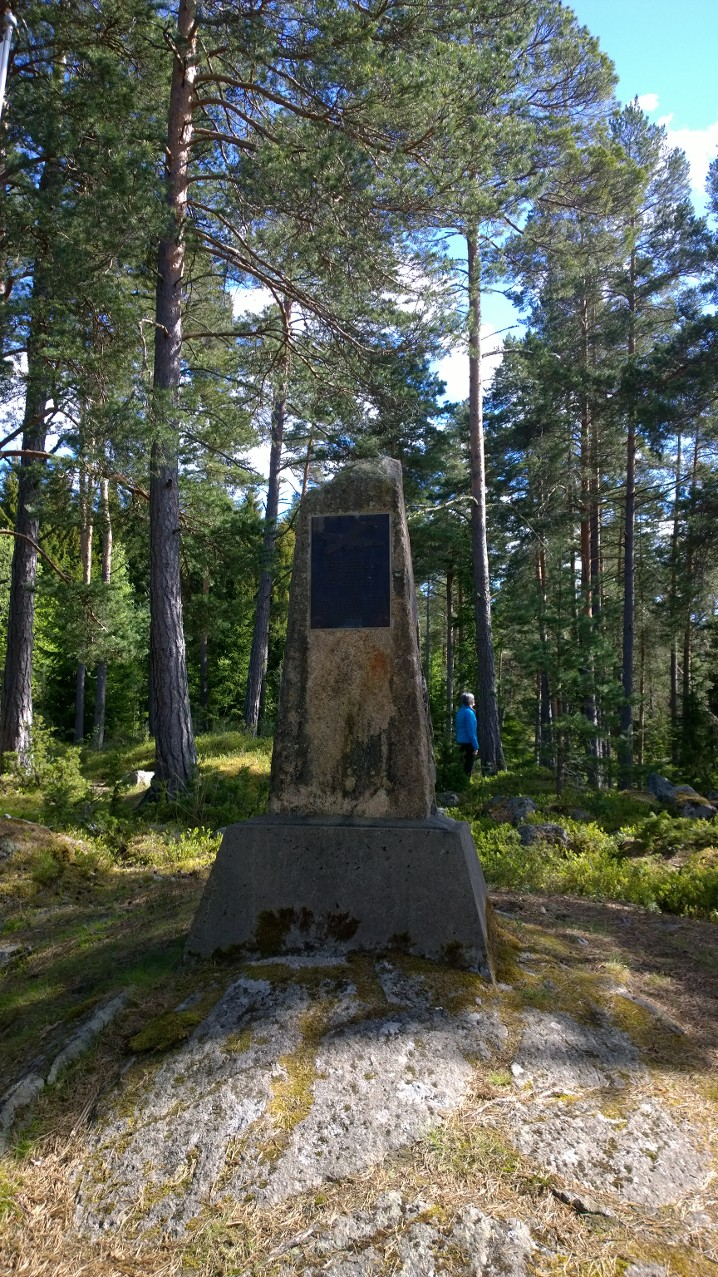 Minnesten, med plakett, reist av forsvarsvenner og avduket 23. april 1995